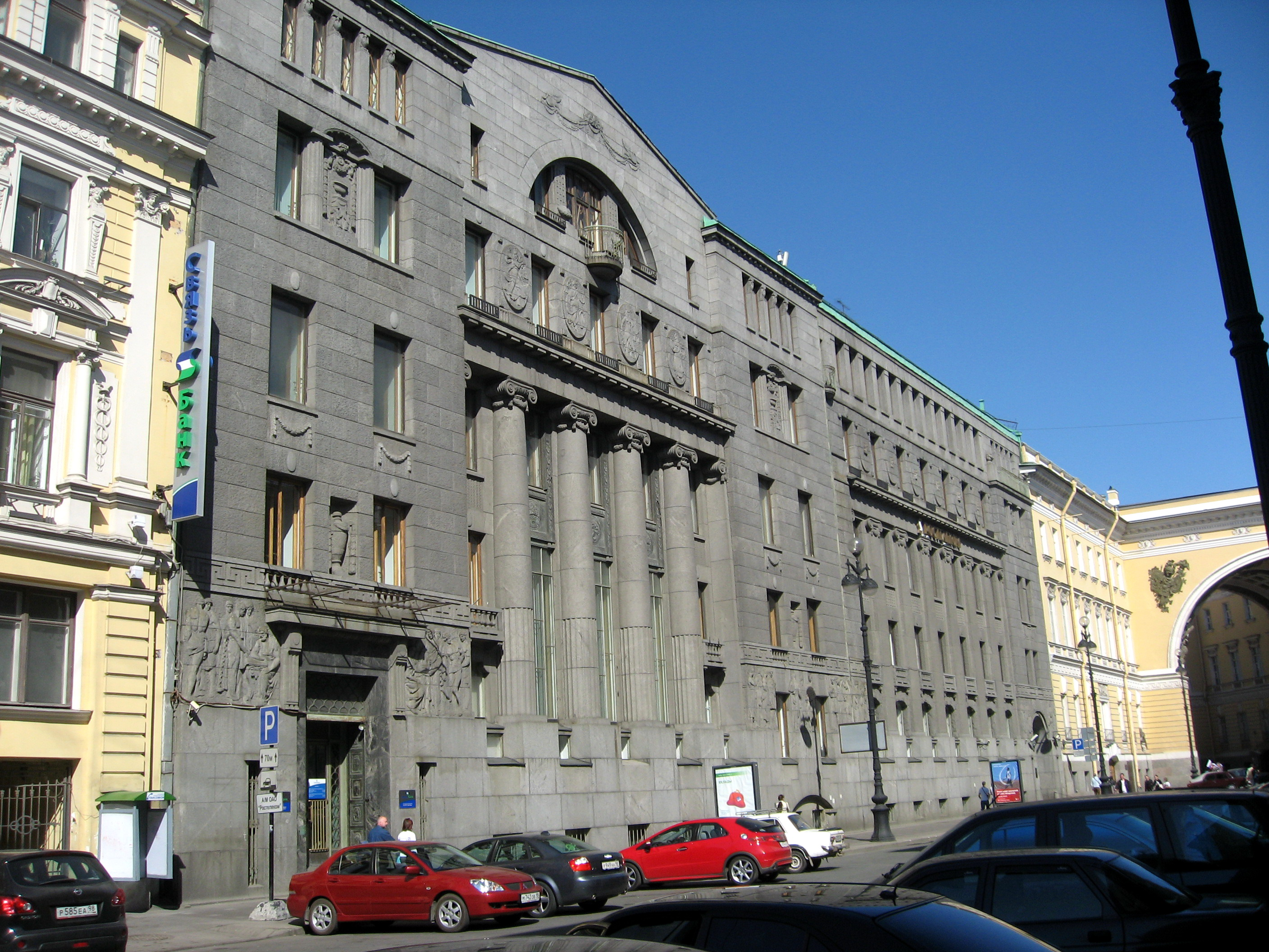 Sankt-Petěrburg (Petrohrad)